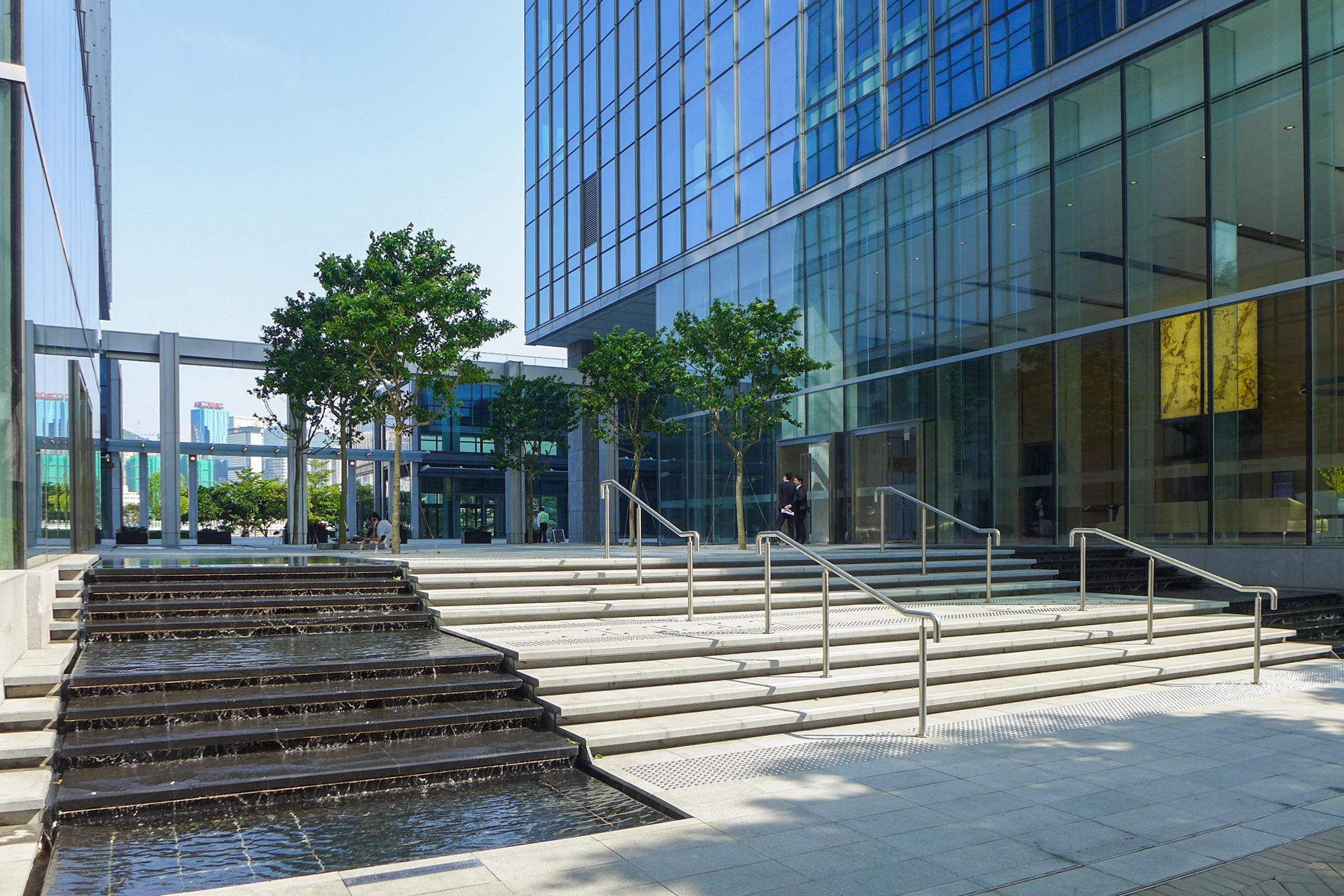 One HarbourGate Entrance